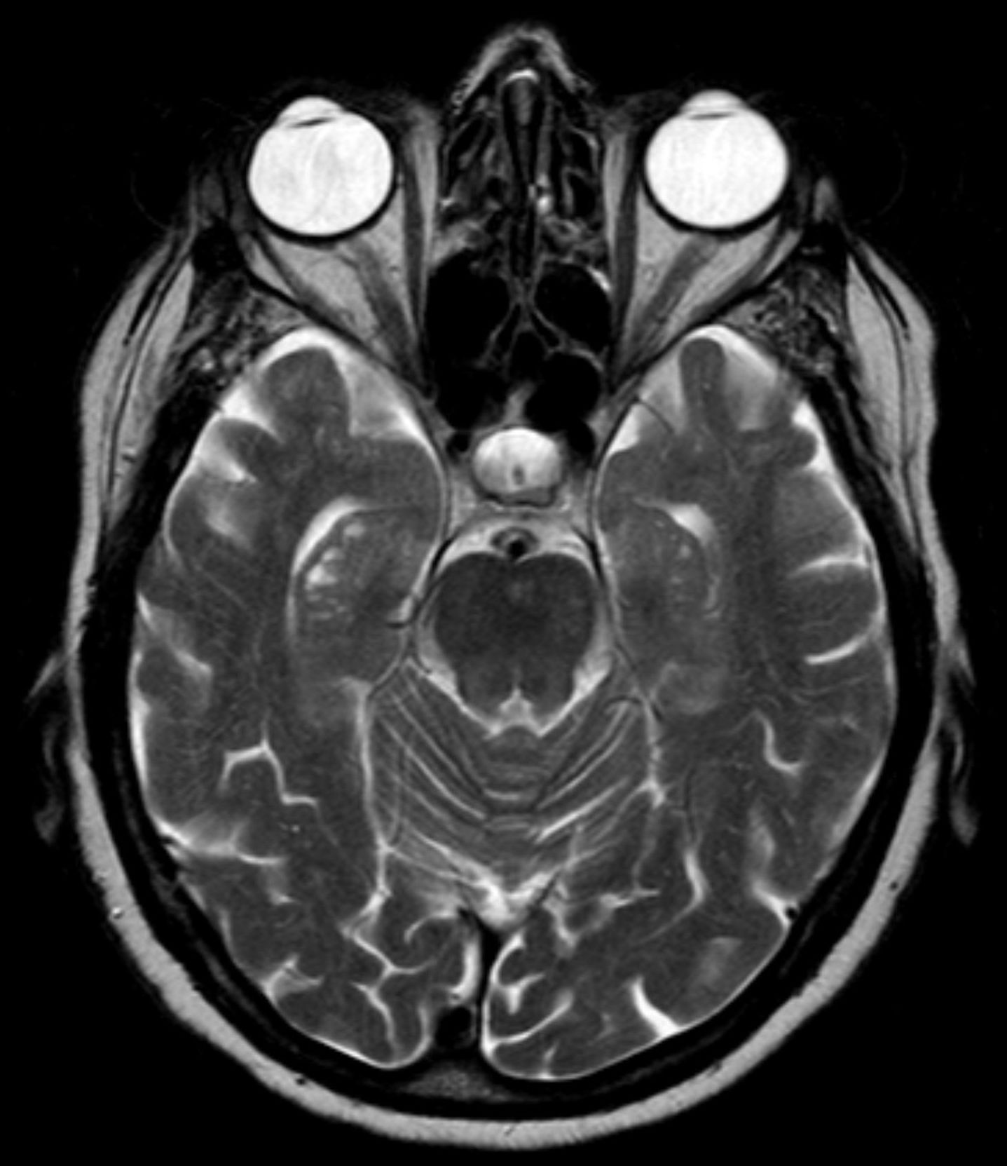 Hippocampale Sulcusreste in der MRT T2 axial rechts (im Bild links) mehr als links.